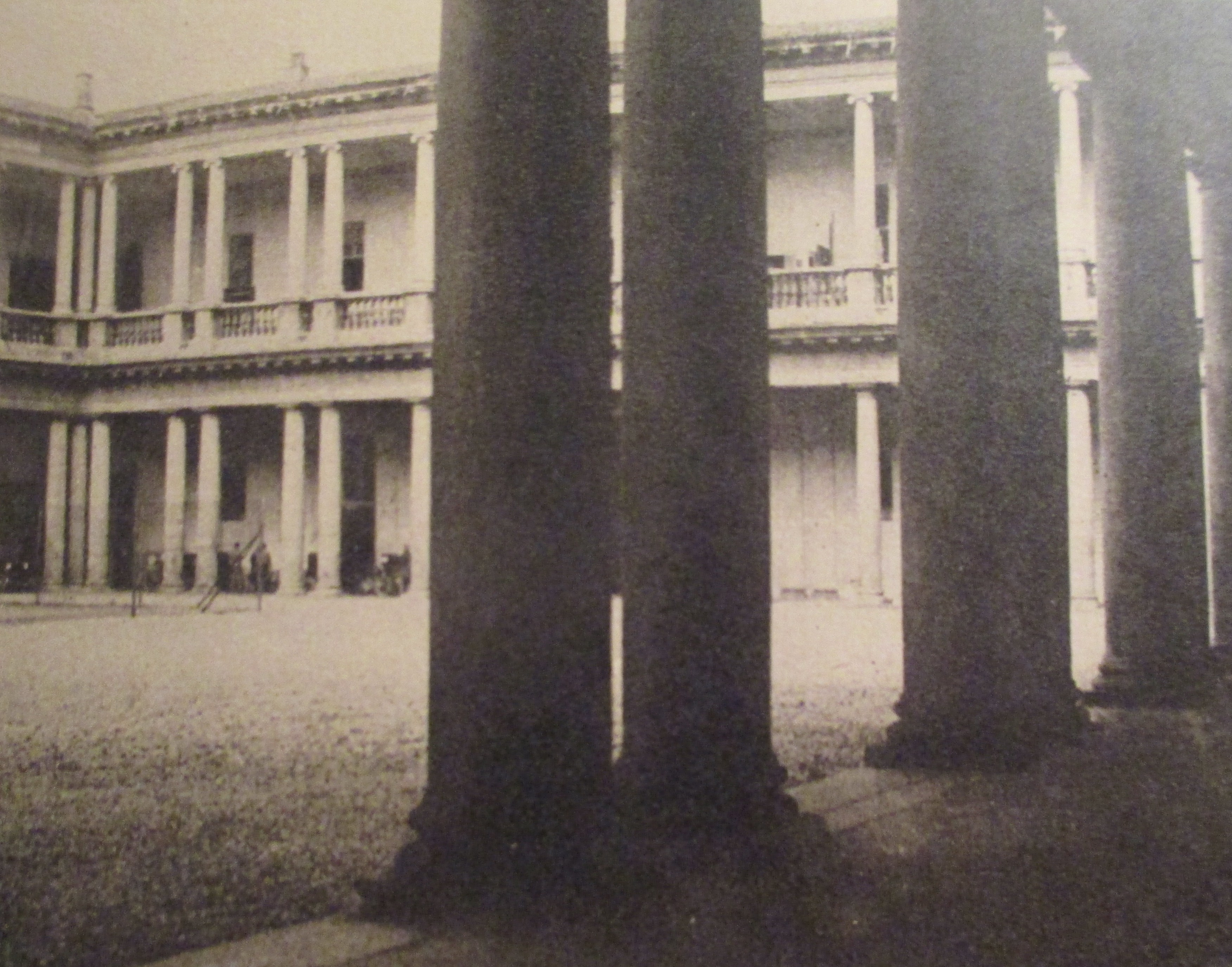 Grand séminaire de Milan: photographie parue dans L'Illustration, hors série de février 1939 consacré à la mort de Pie XI. C'est ici qu'étudia le futur pape dans sa jeunesse.